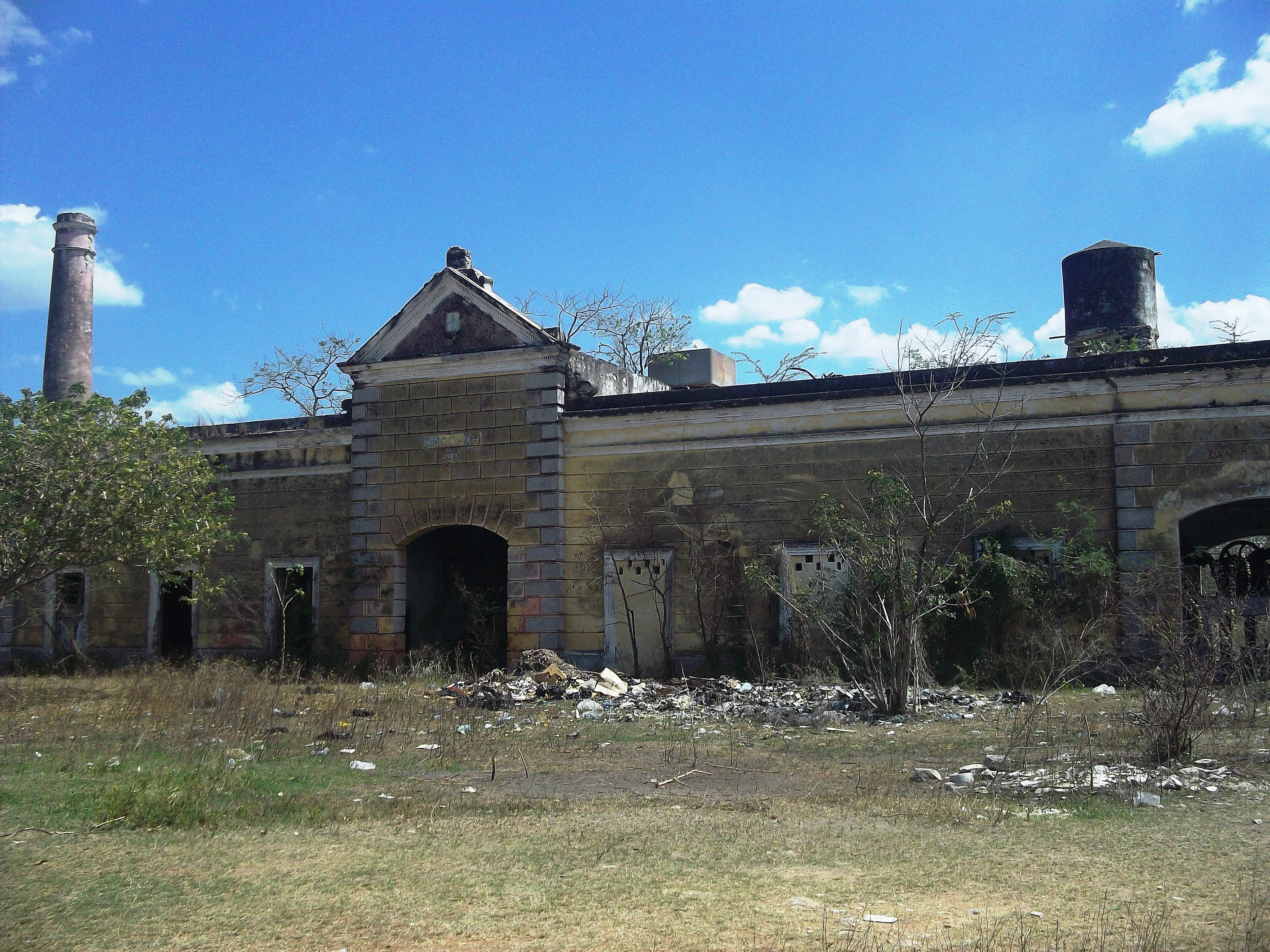 Hacienda de Chochoh, Yucatán.